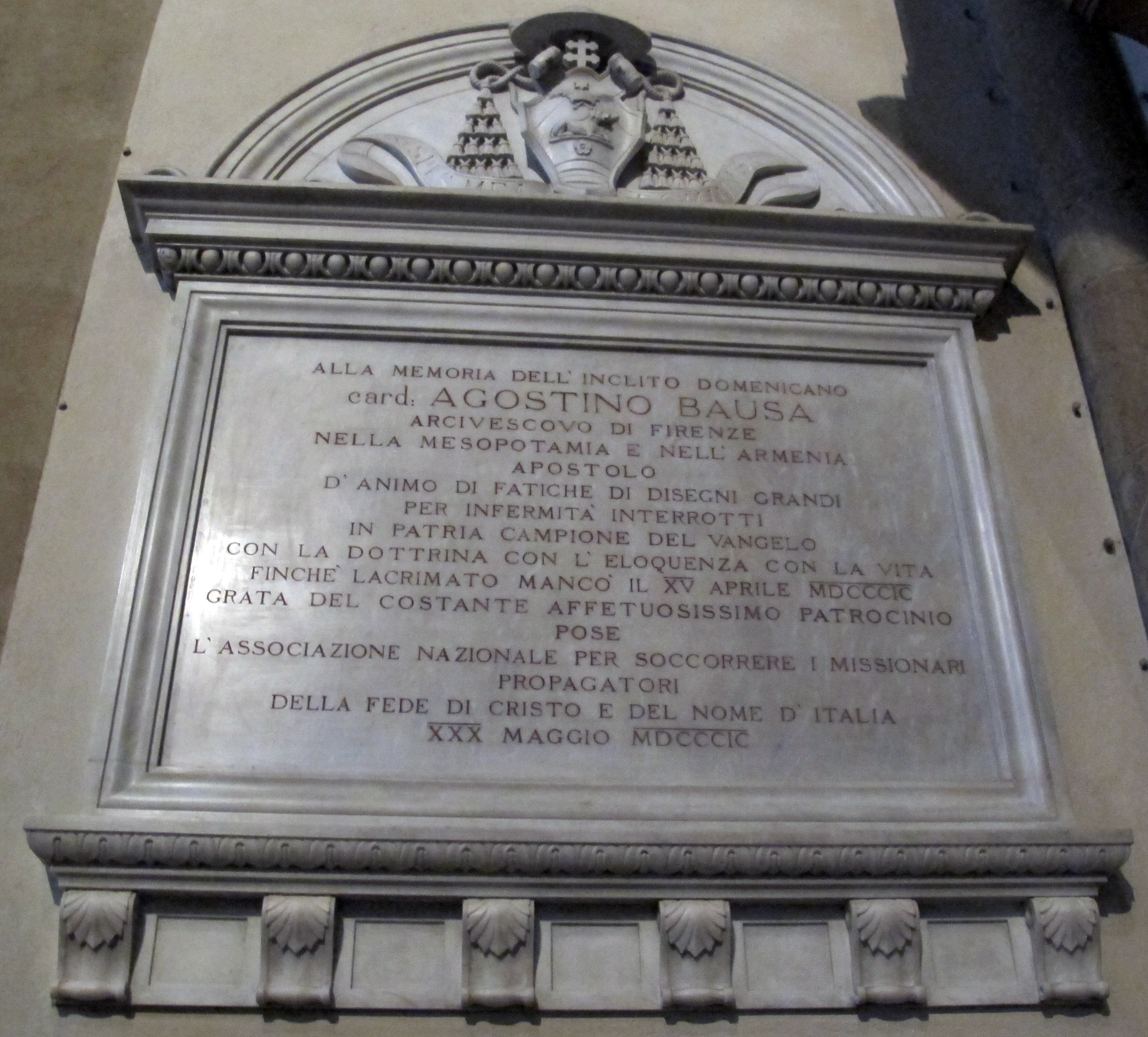 Smn, transetto dx, lapide al cardinale agostino bausa